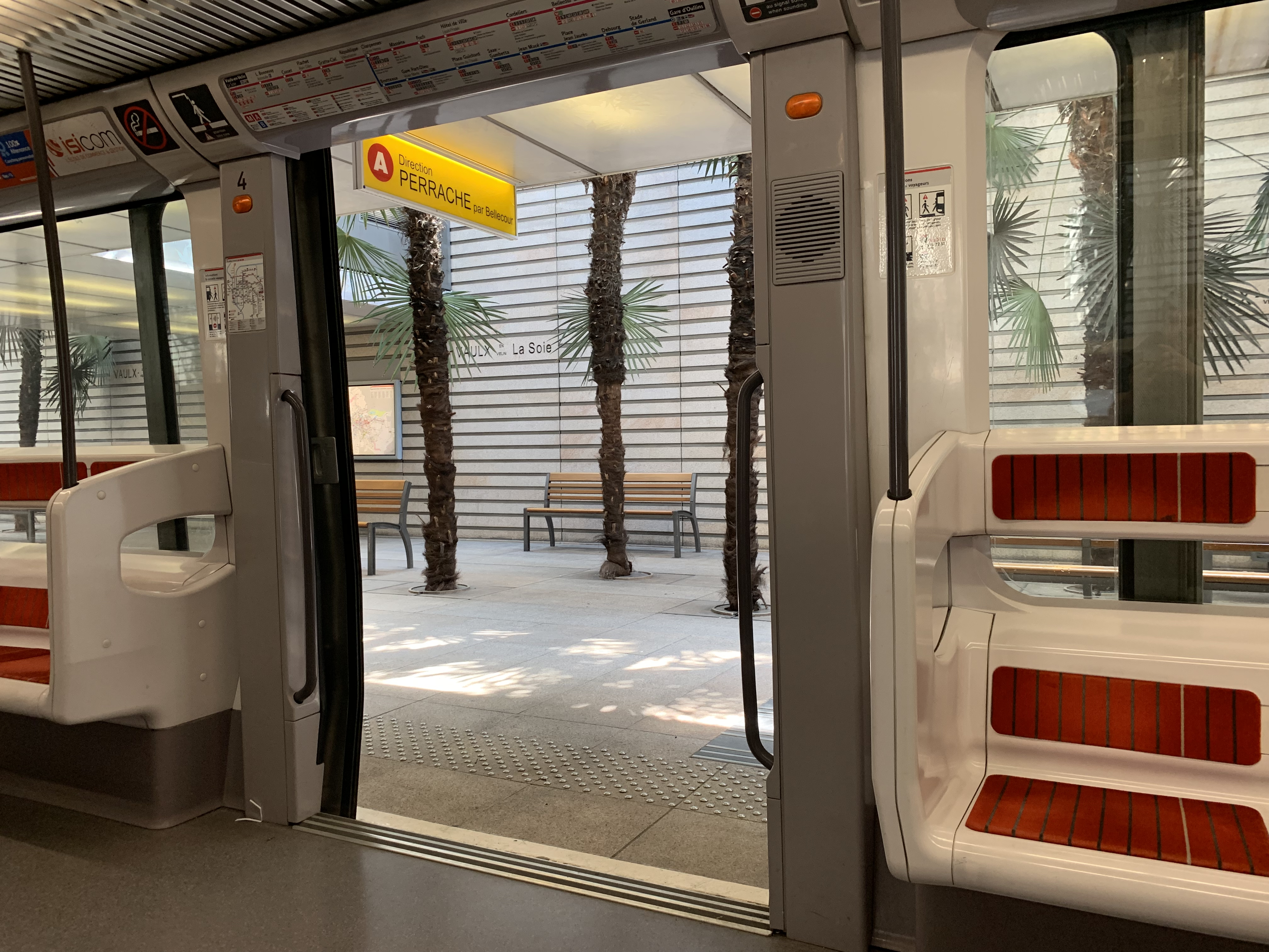 Vaulx-en-Velin - La Soie (Lyon Metro), avril 2019.